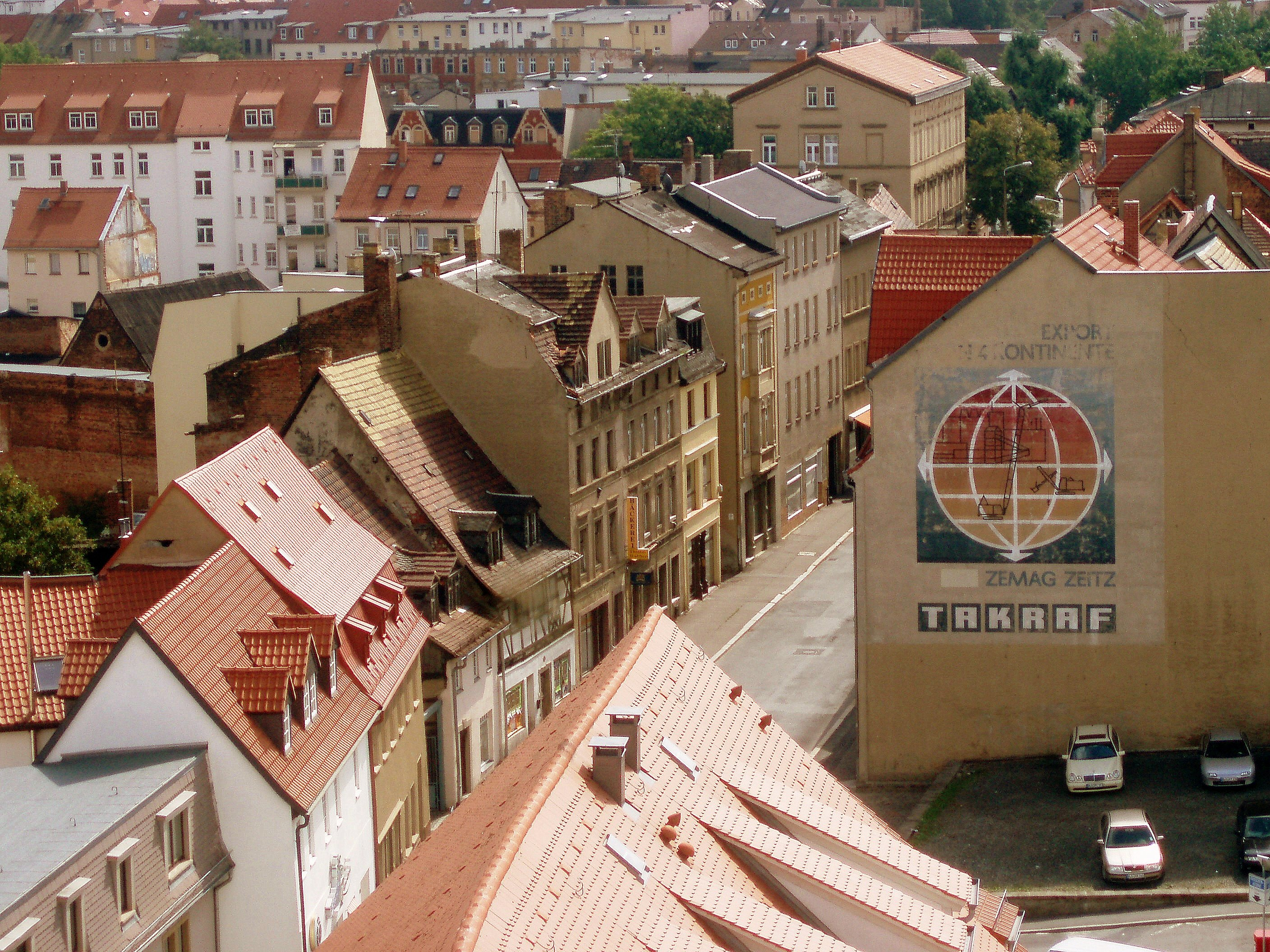 Zeitz Kalkstraße